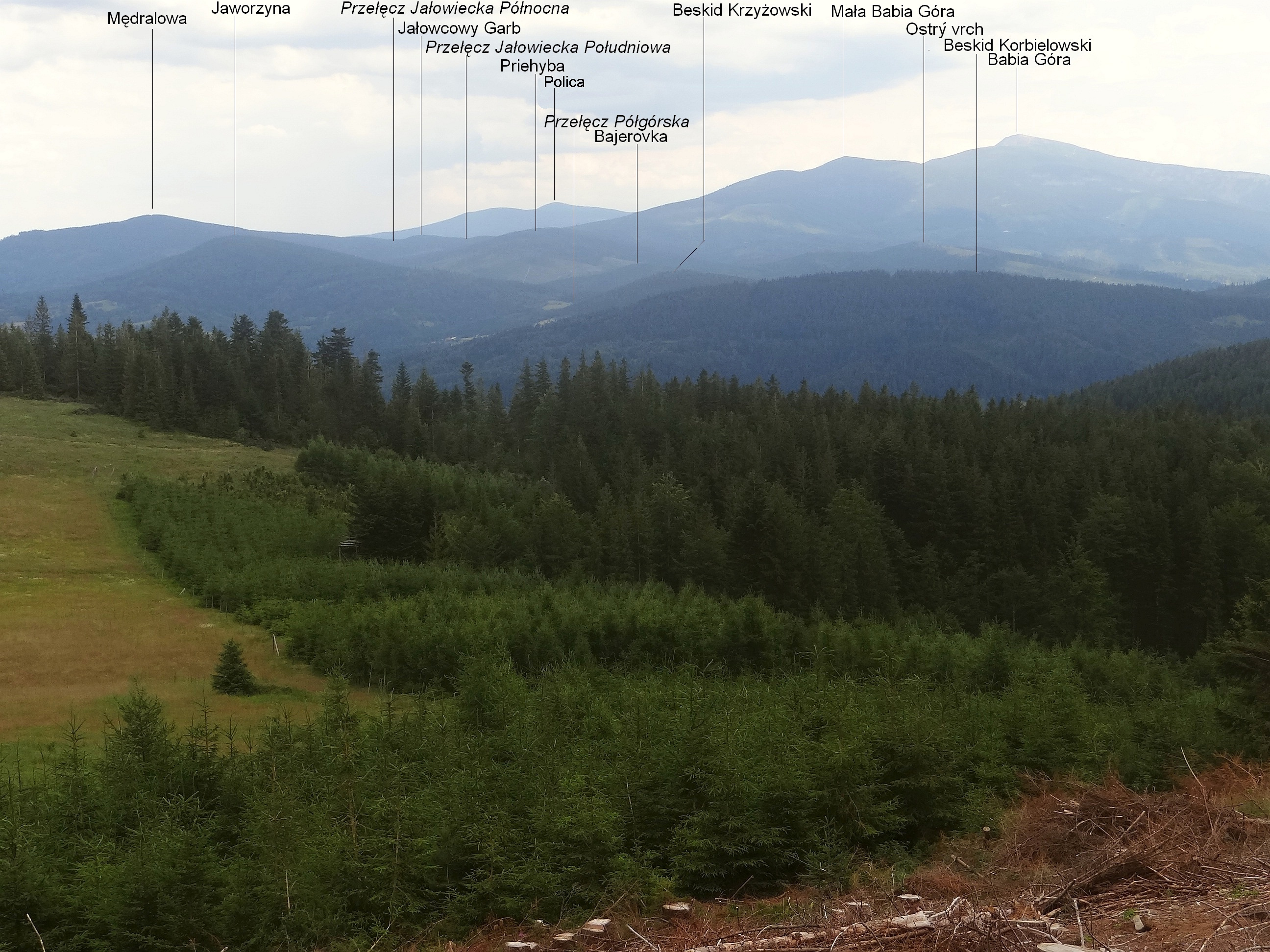 Widok z Polany Malorka